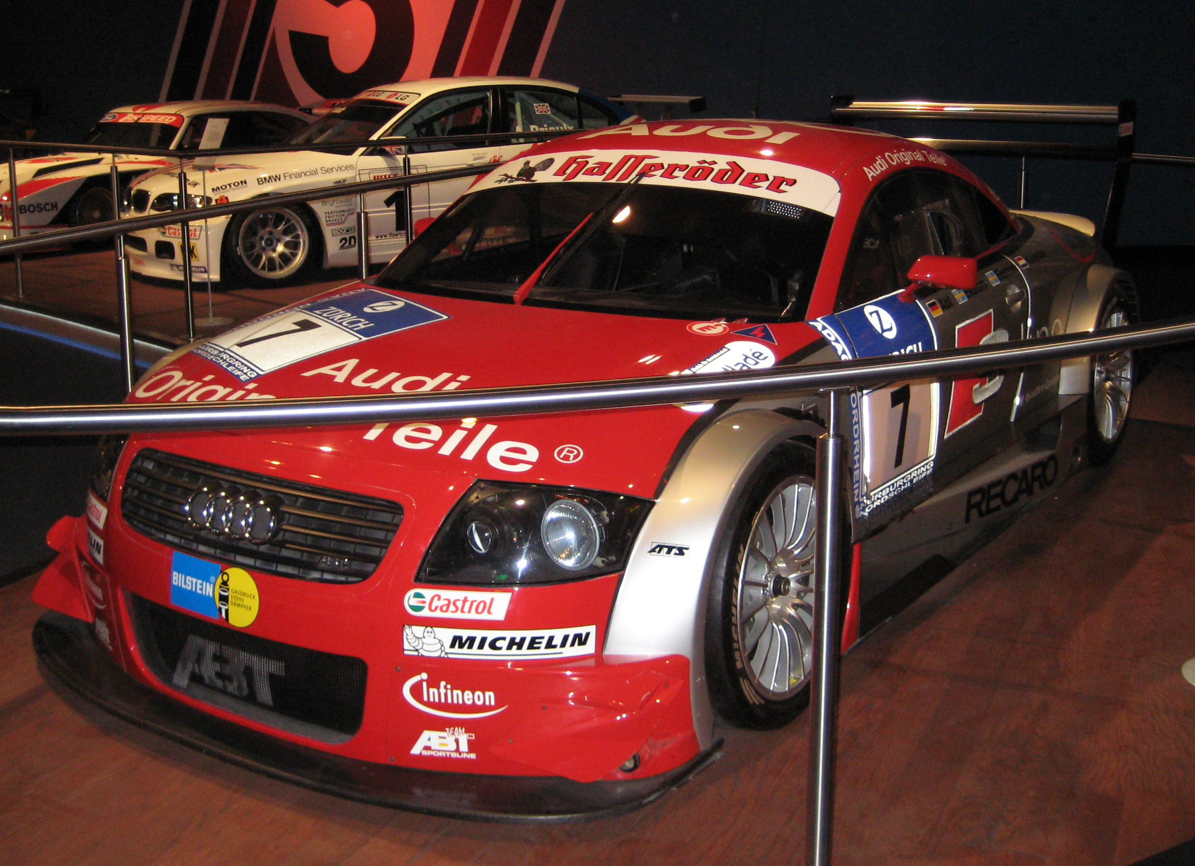 Abt-Audi TT-R aus 2003 in der Ausstellung ringwerk am Nürburgring